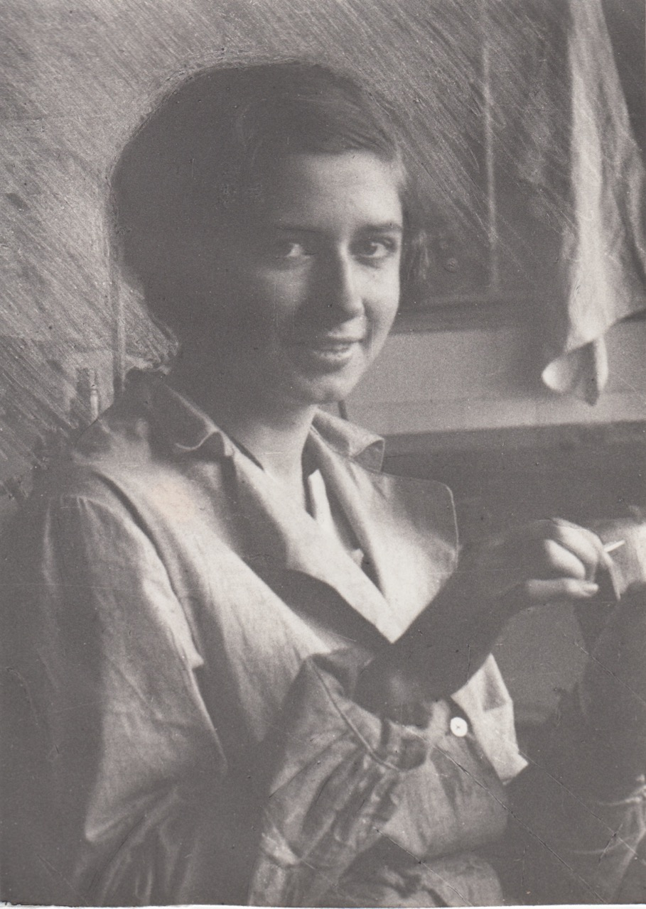 Portrait de Madeleine Pauliac-1931-étudiante en médecine